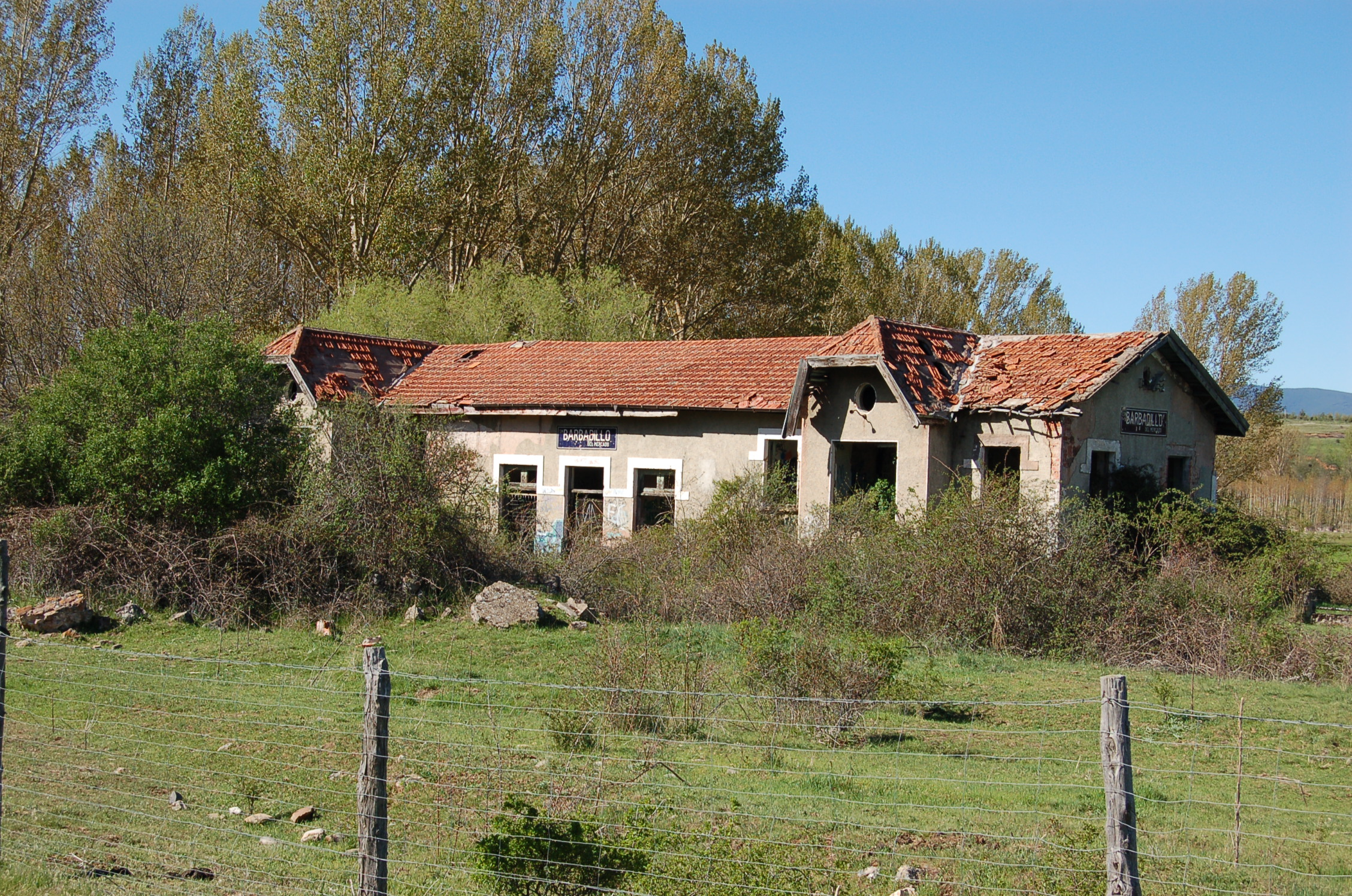 Estación de ferrocarril de Barbadillo del Mercado